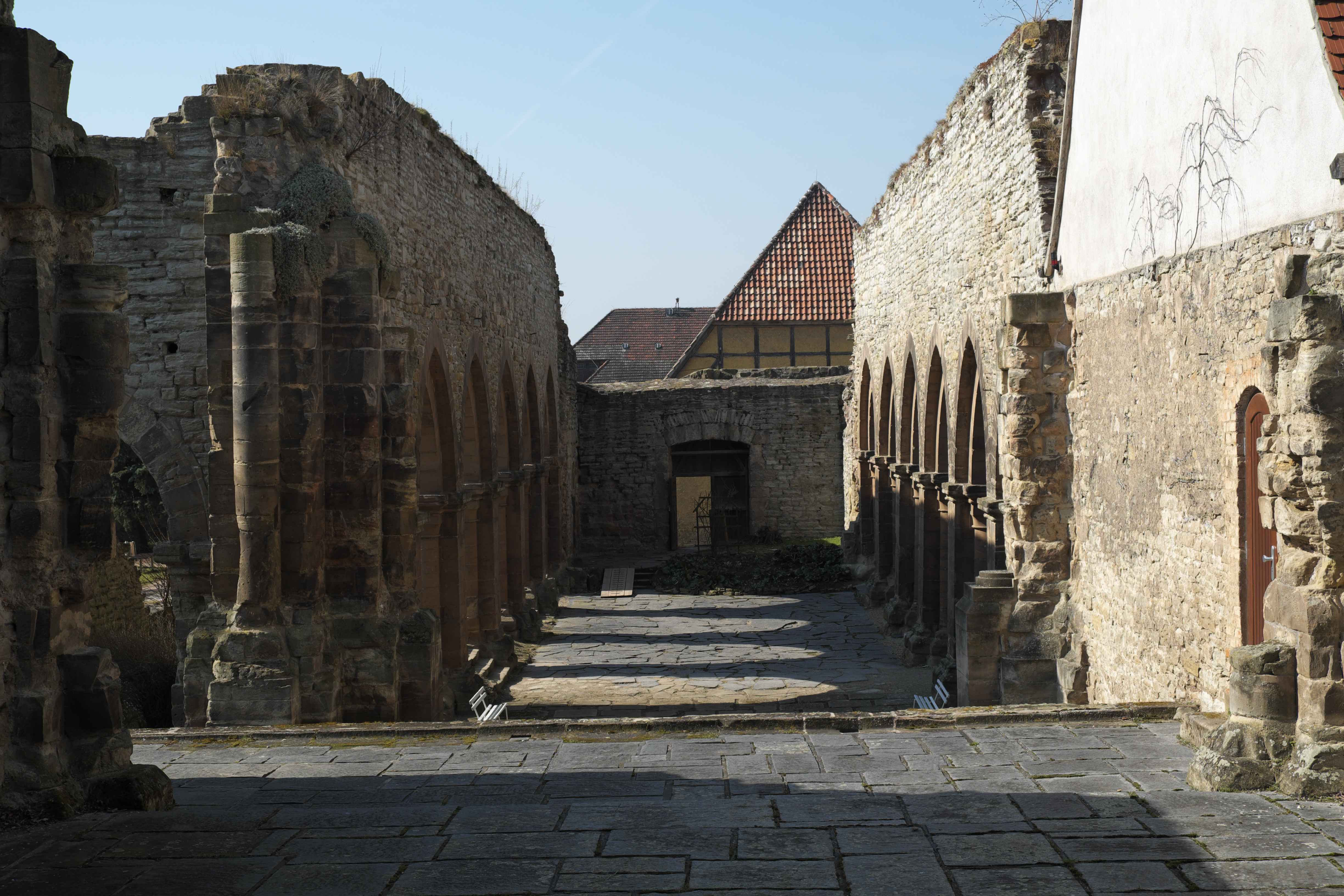 Ruinen der Marienkirche, ehemalige Klosterkirche in Memleben im Burgenlandkreis in Sachsen-Anhalt/Deutschland